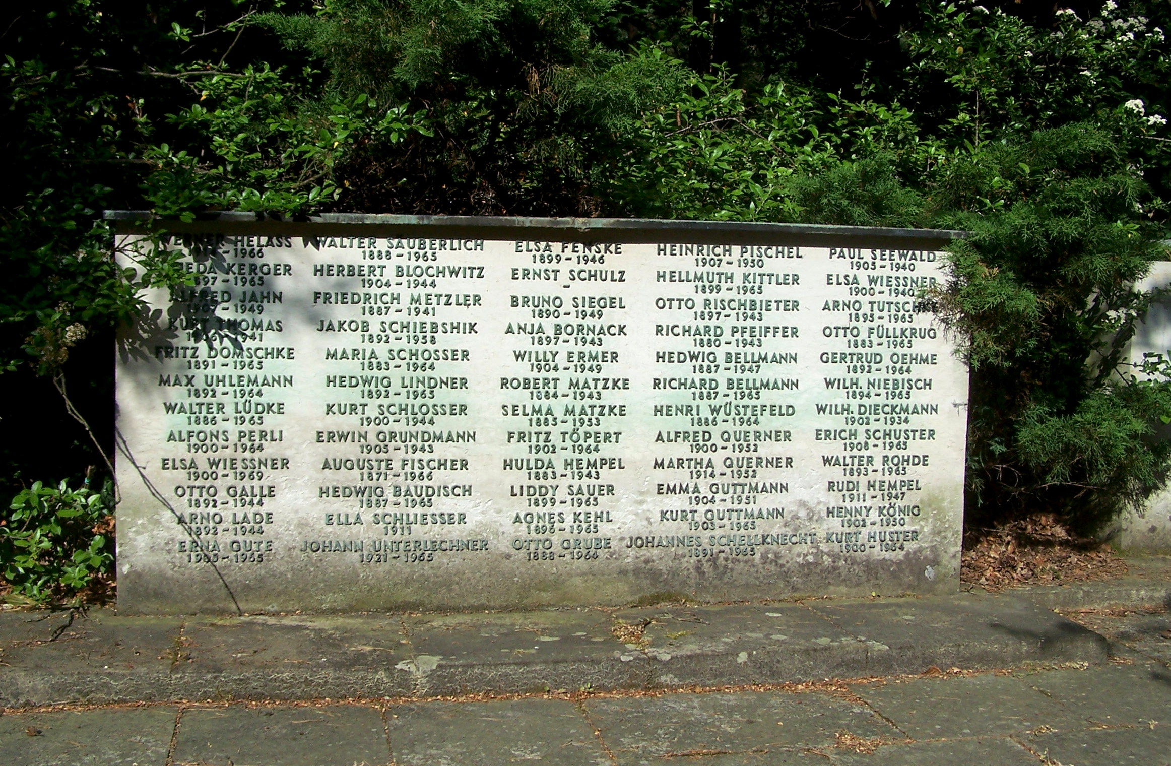 Grab von Elsa Fenske auf dem Heidefriedhof in Dresden